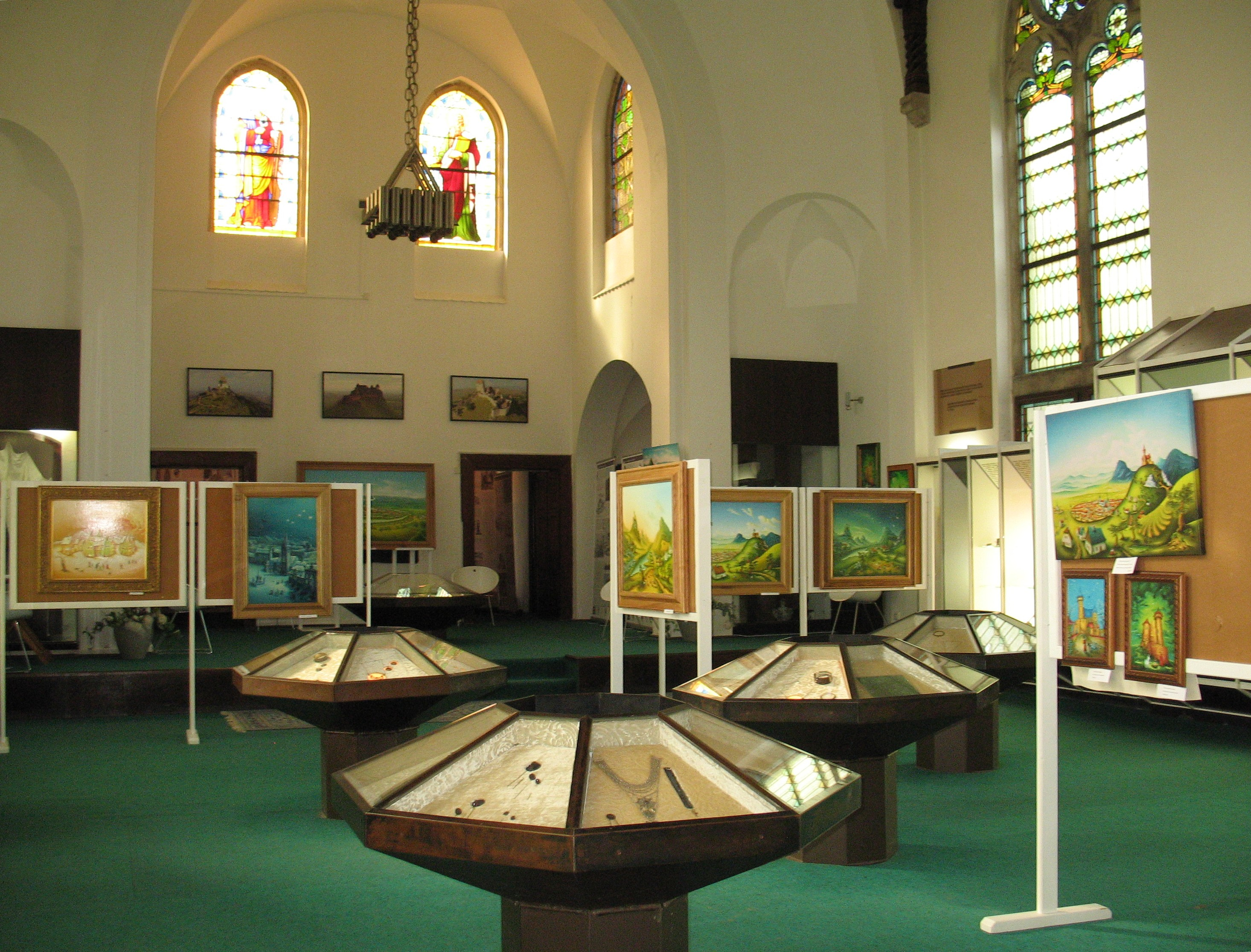 Interiér muzea